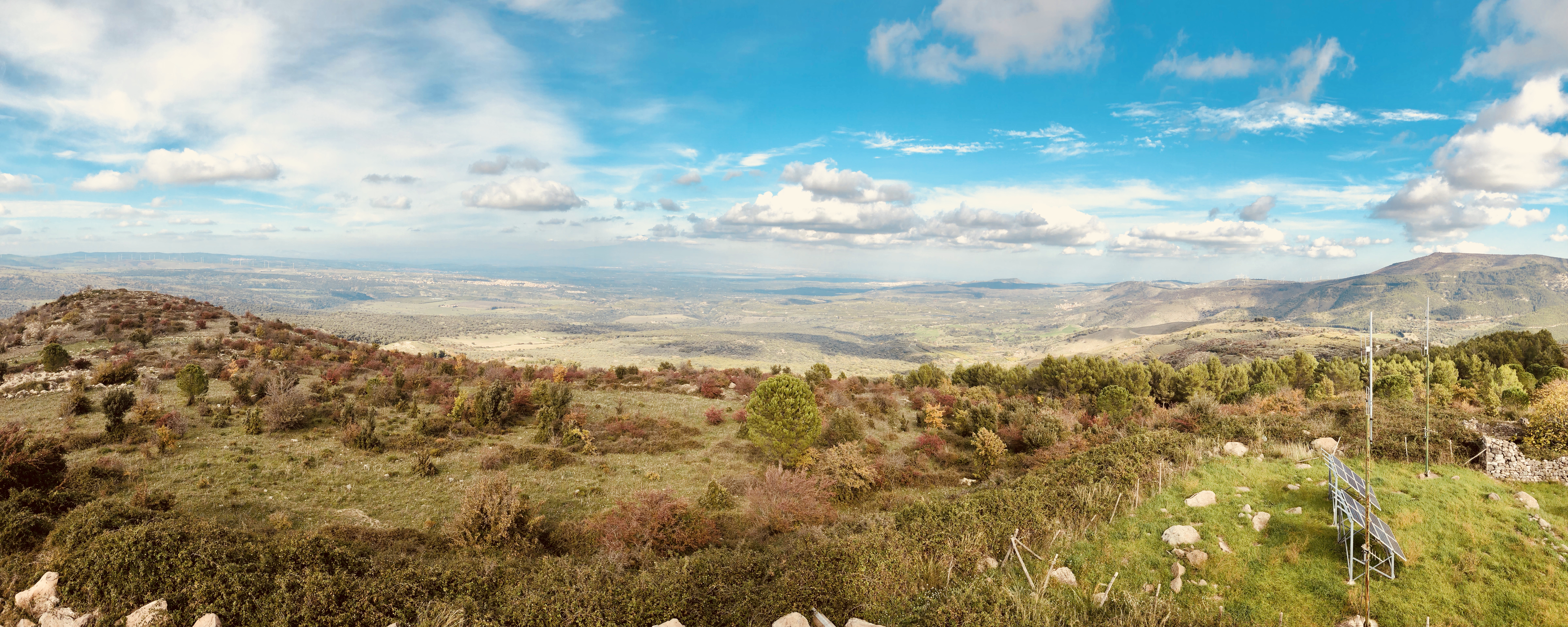 Vista dai monti Iblei